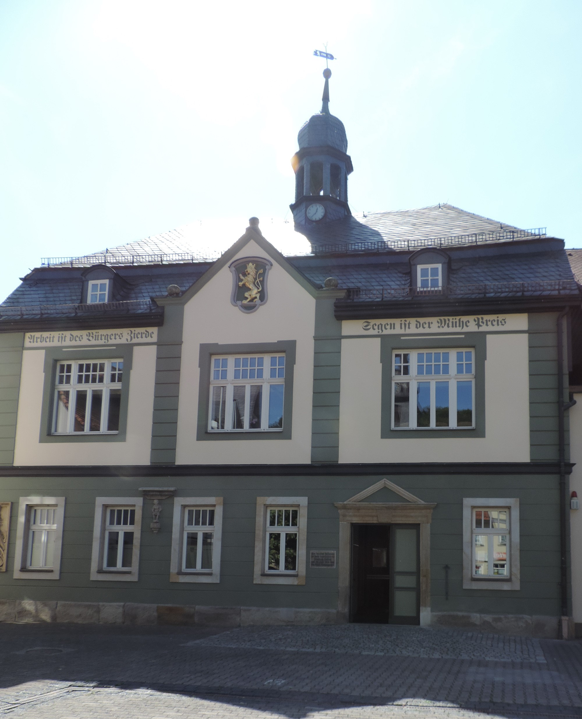 Rathaus Bad Blankenburg